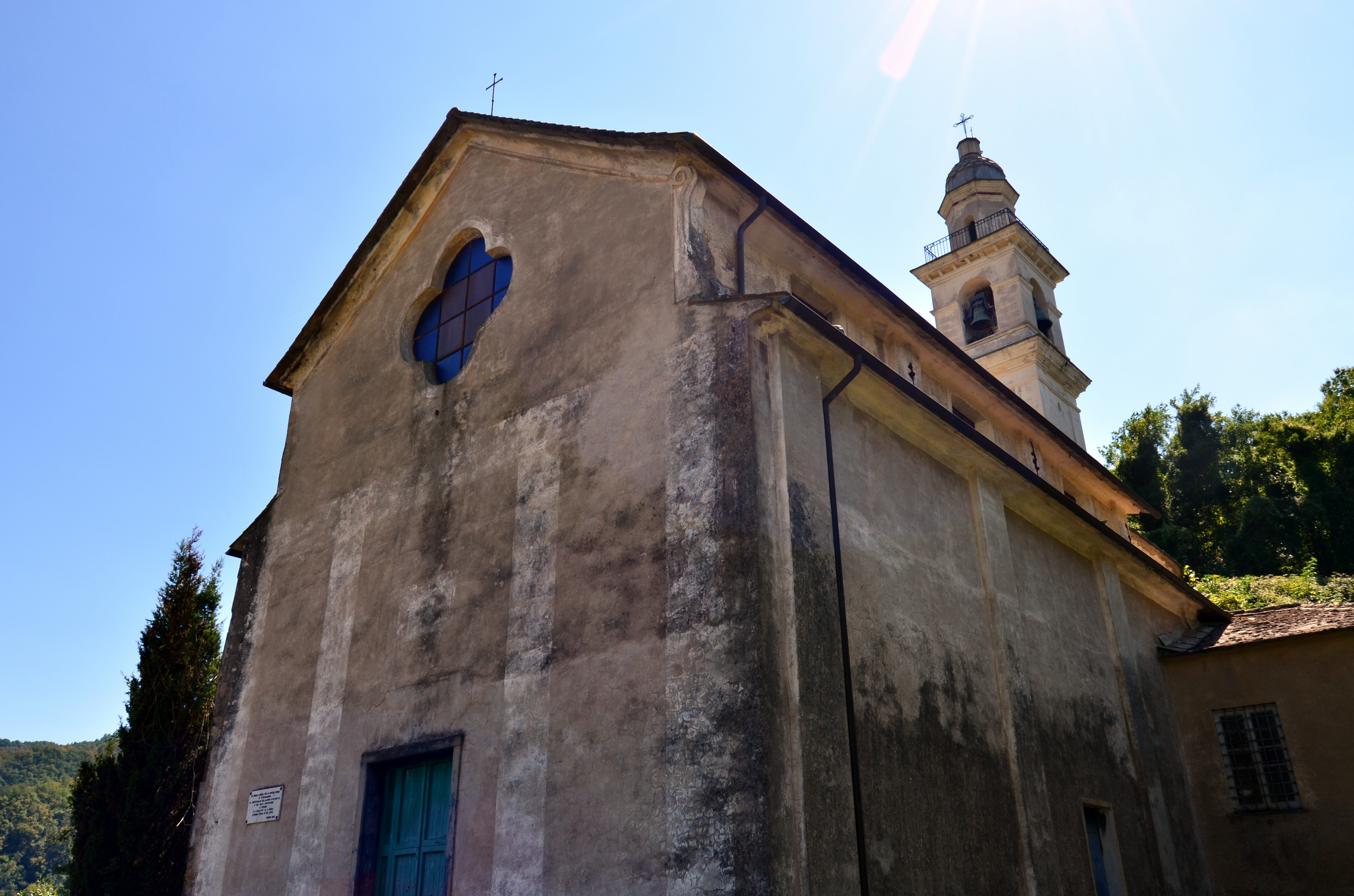 La chiesa di San Martino, Dezerega, Coreglia Ligure, Liguria, Italy